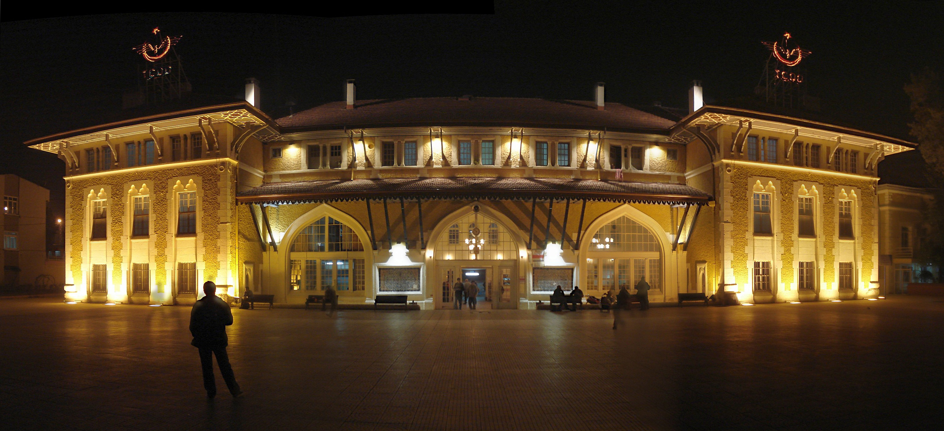 Adana Garı Panoramik Fotoğrafı (Gece)